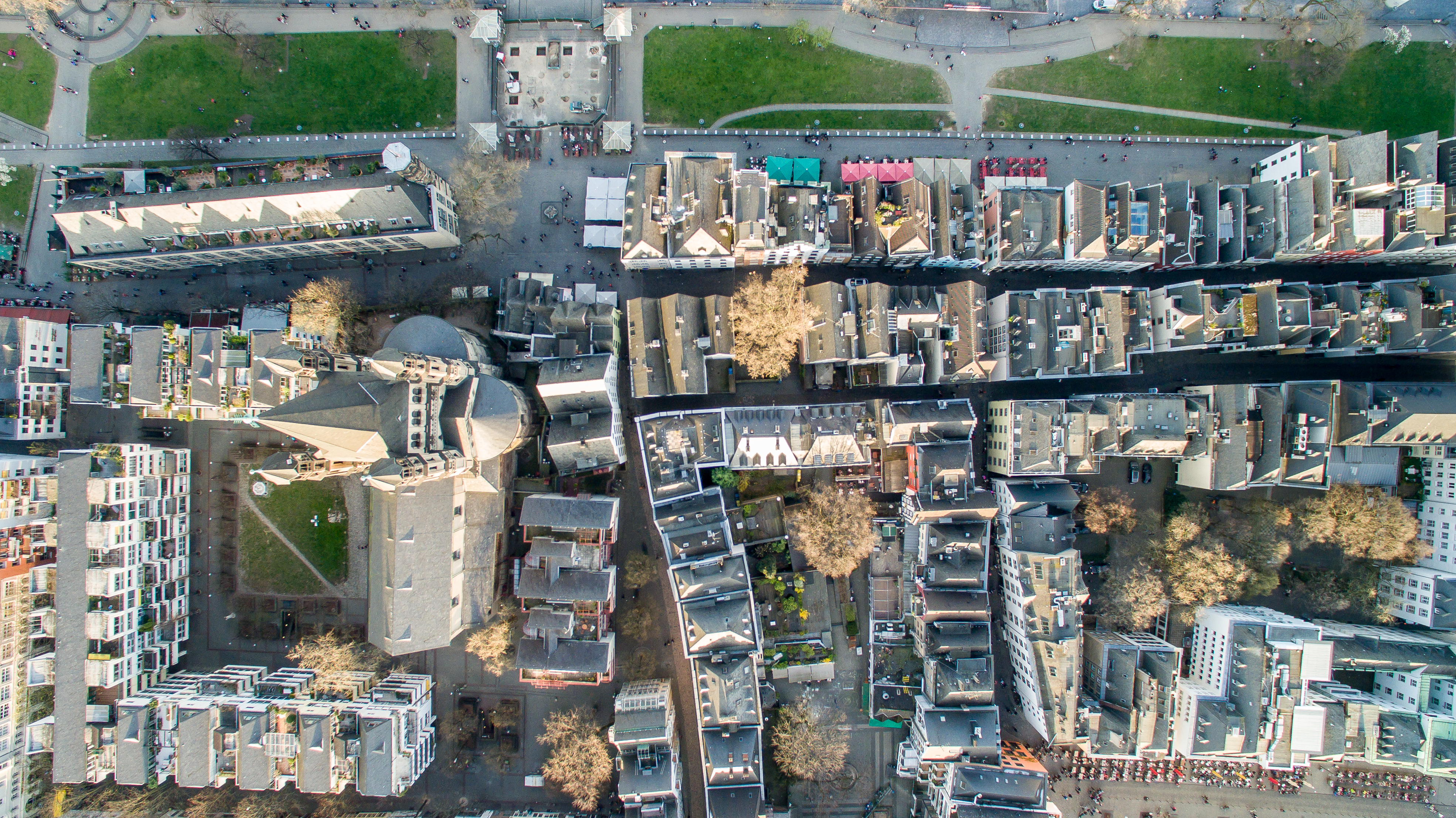 Cologne